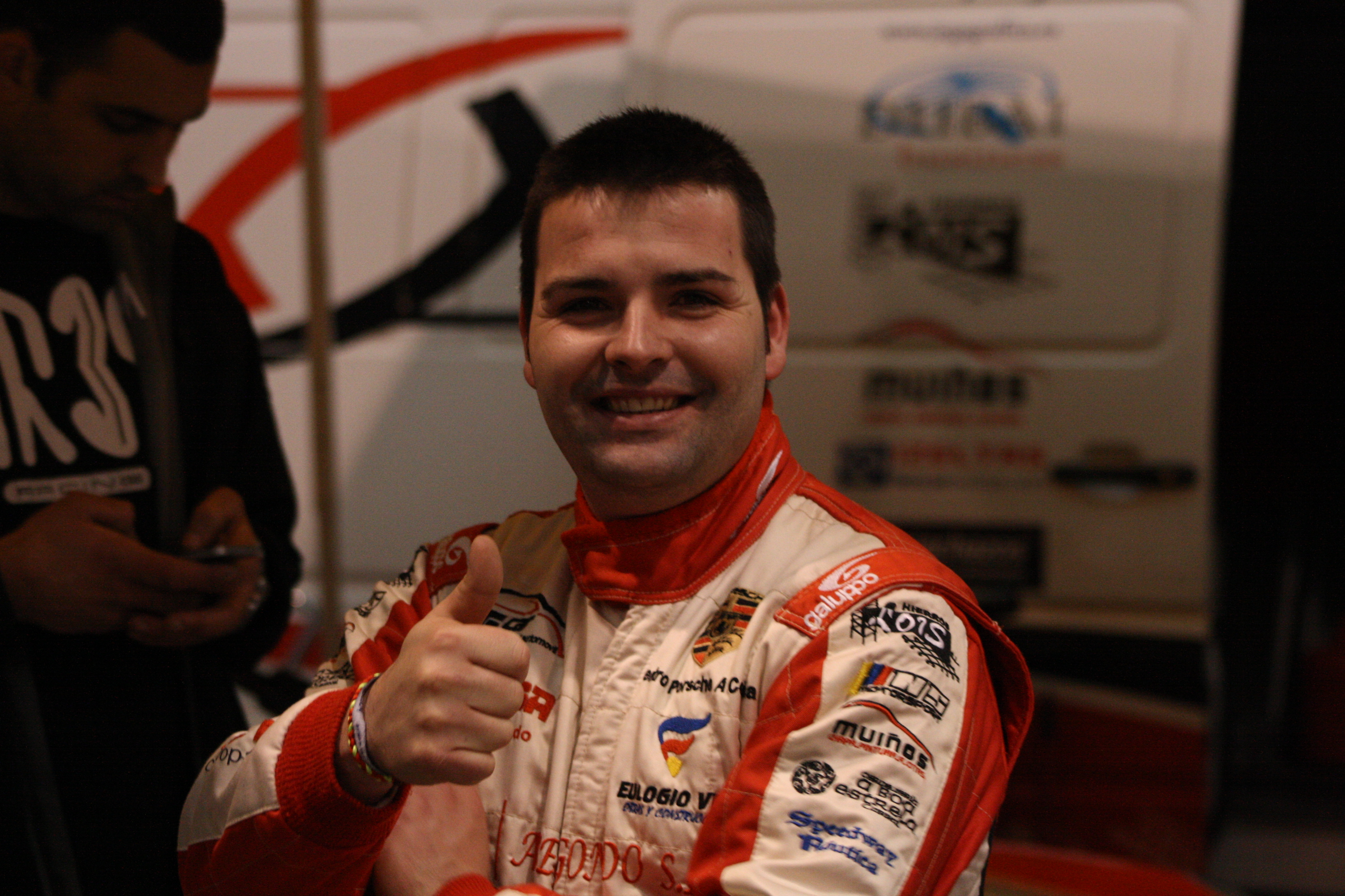 Formula Rally do Cocido 2014 celebrado en el Recinto Feiral de Silleda.